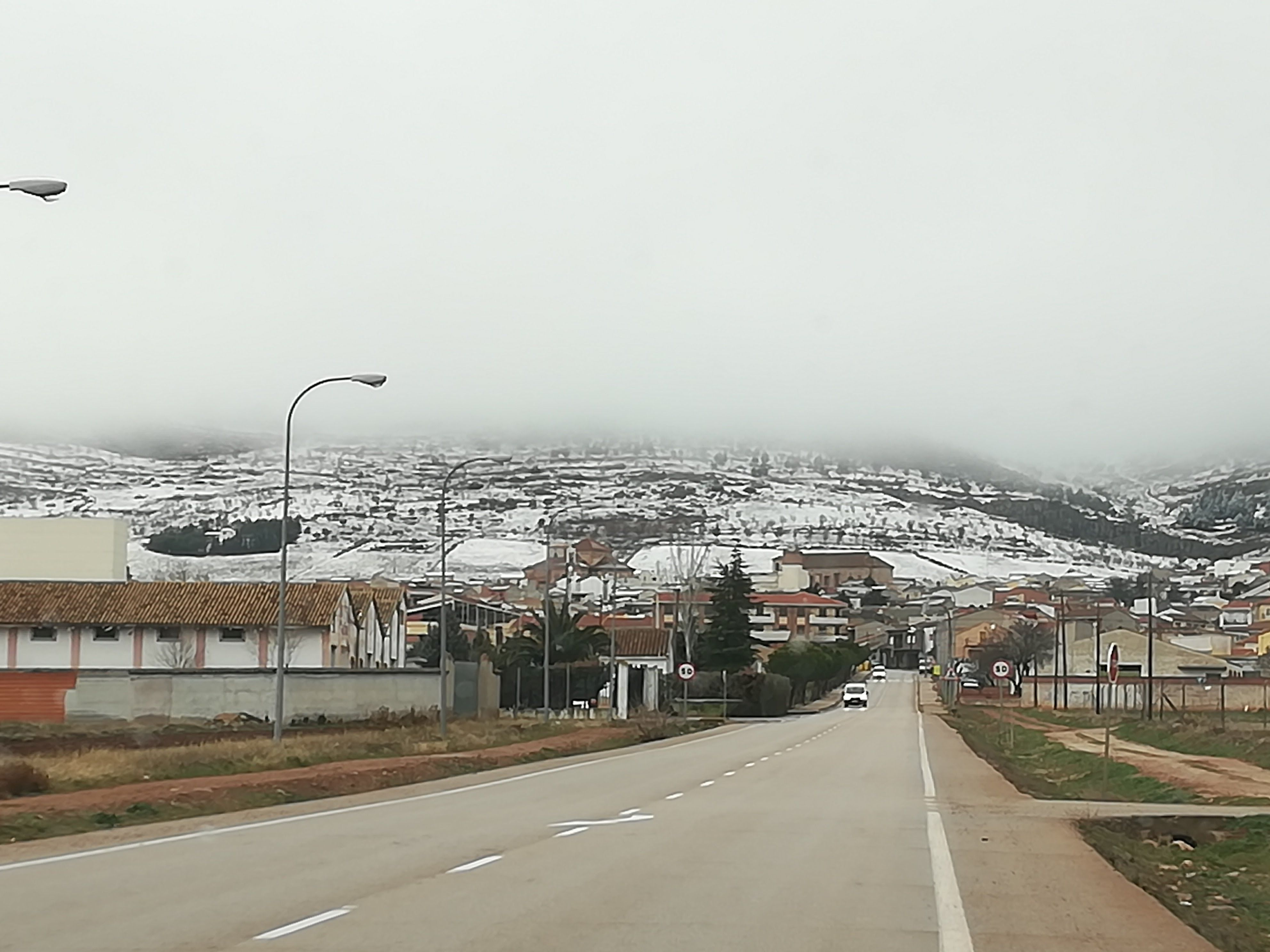 Nevada en Los Yébenes 05-02-2018